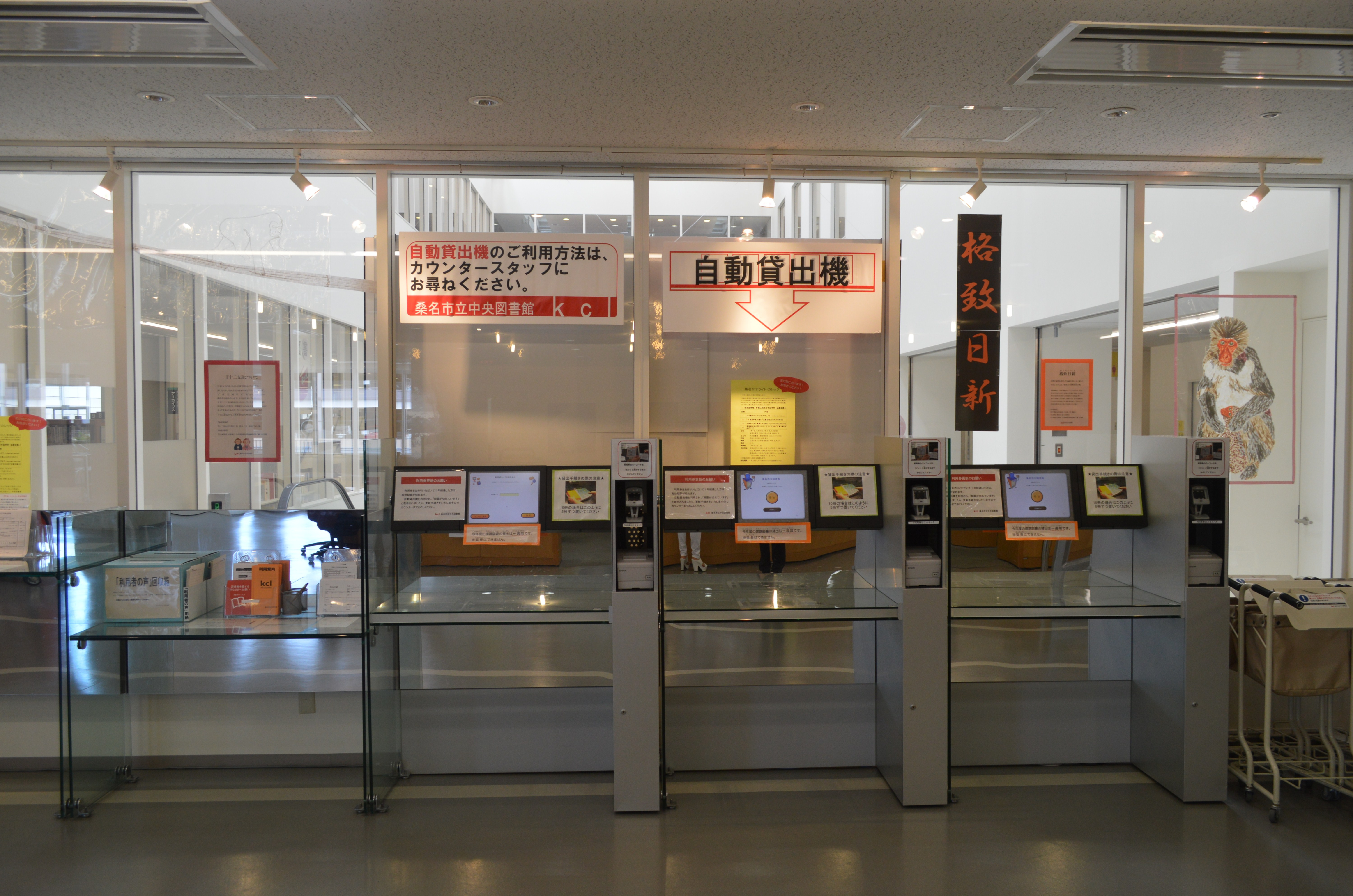 桑名市立中央図書館3階の自動貸出機